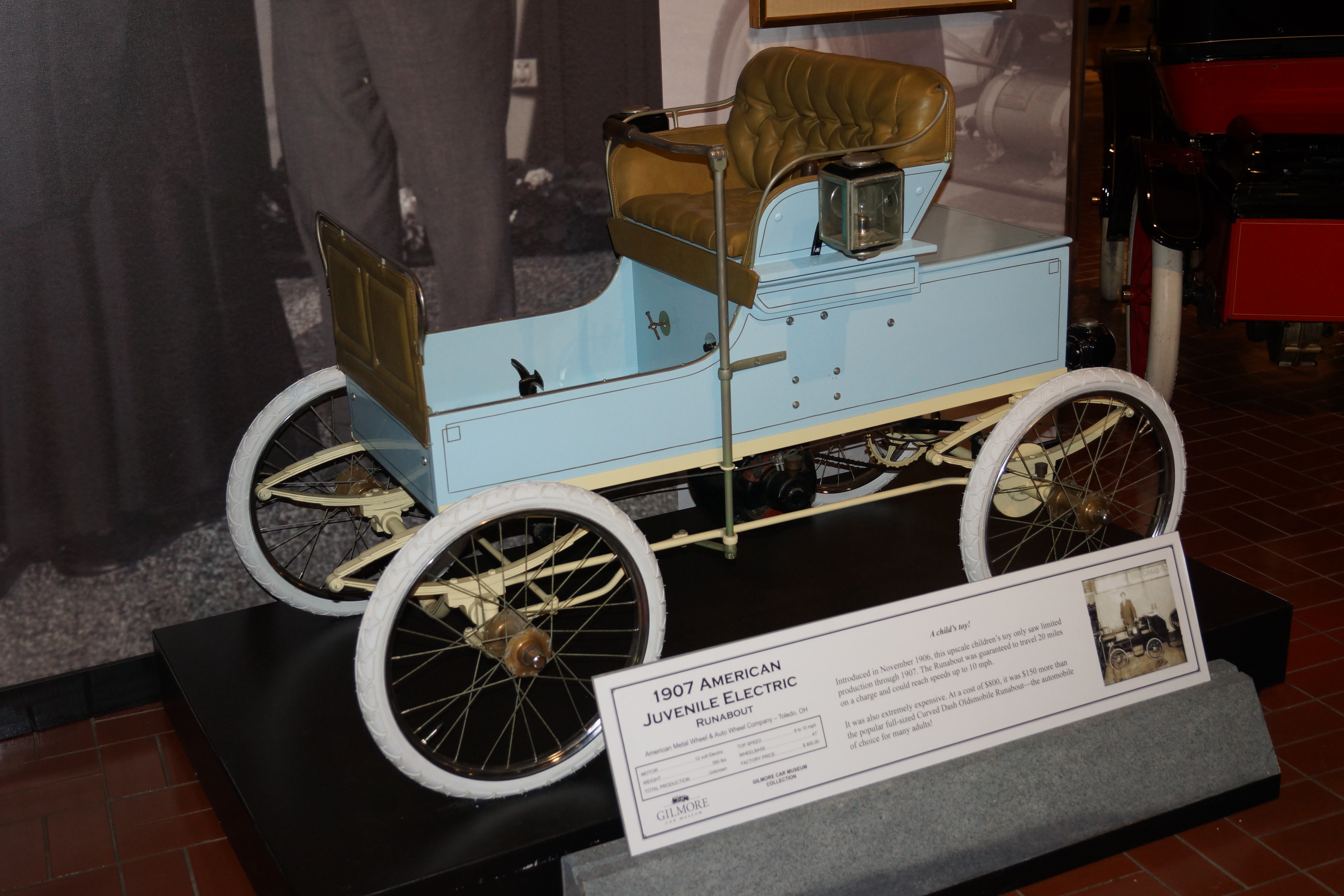 1907 American Juvenile Electric Runabout